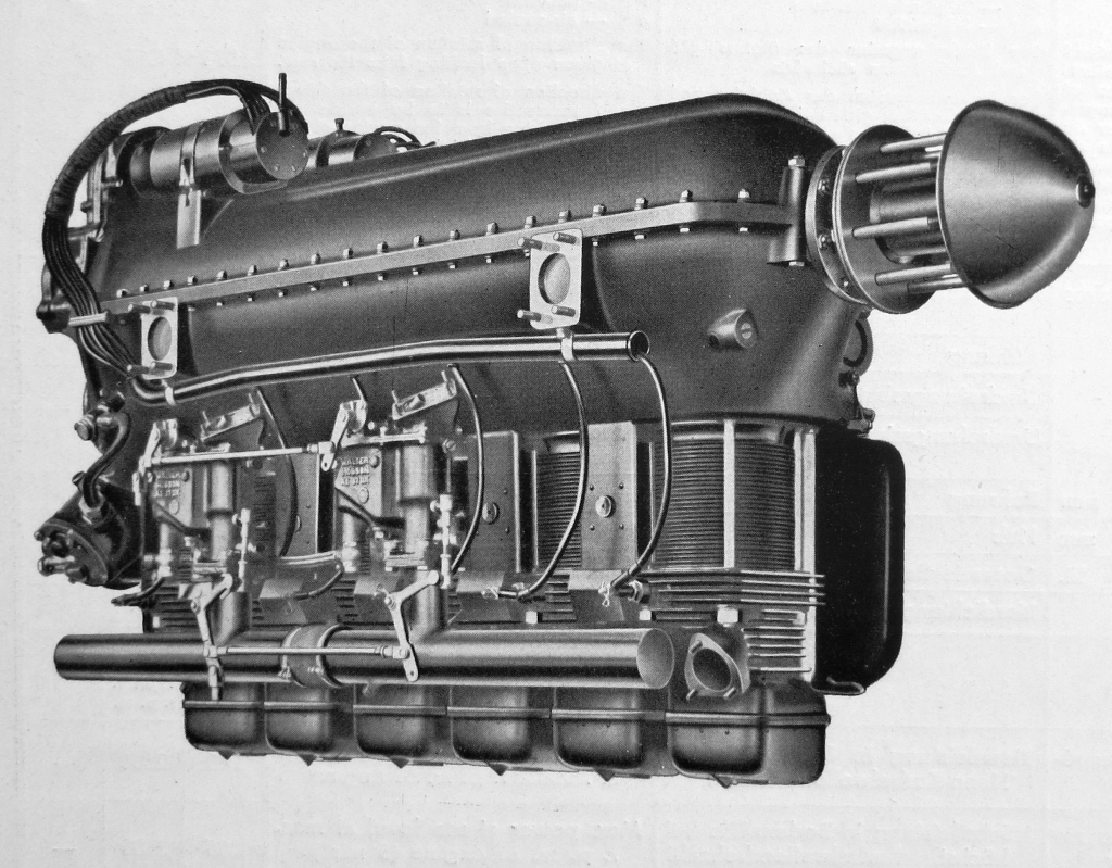 letecký motor Walter Minor 6-I (1936)